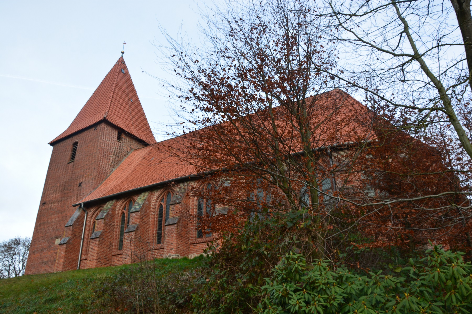 Die St. Martins-Kirche zu Raven von Südosten.